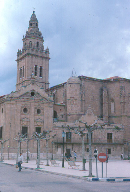 Iglesia de los Santos Juanes - Nava del Rey (Valladolid) - Diapositiva 48 x 48 Color